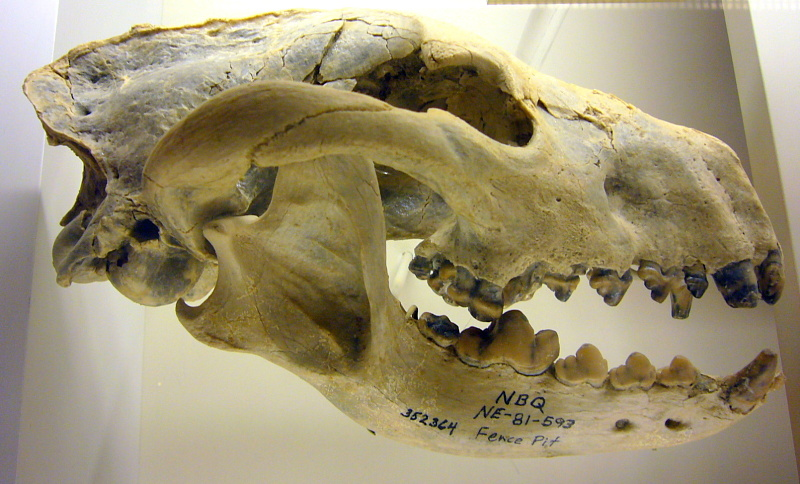 Fossil of Aelurodon, a fossil Canidae from Miocene